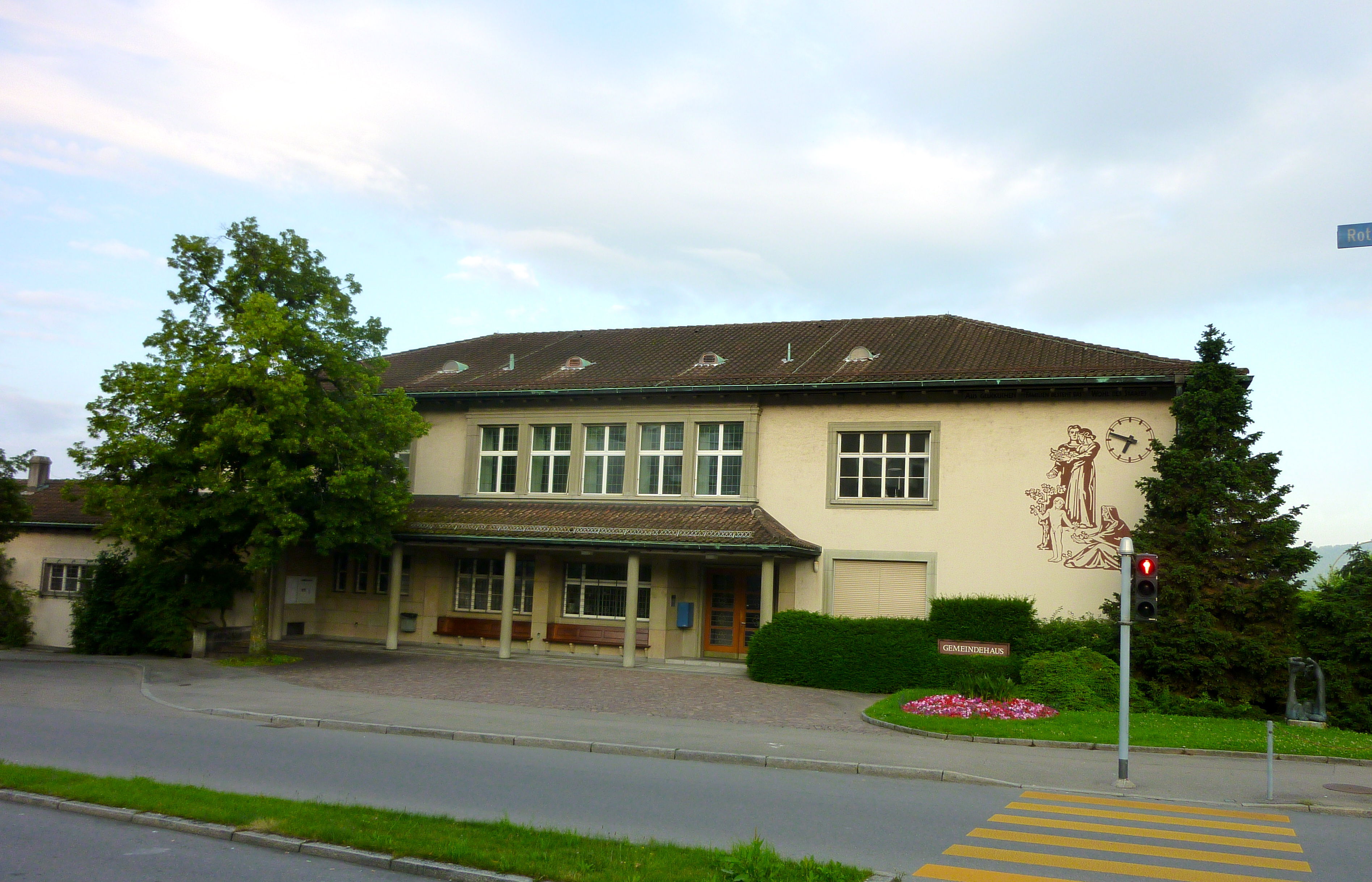 Zollikon: Gemeindehaus, eröffnet 17. Oktober 1940; Architekt Hermann Weideli